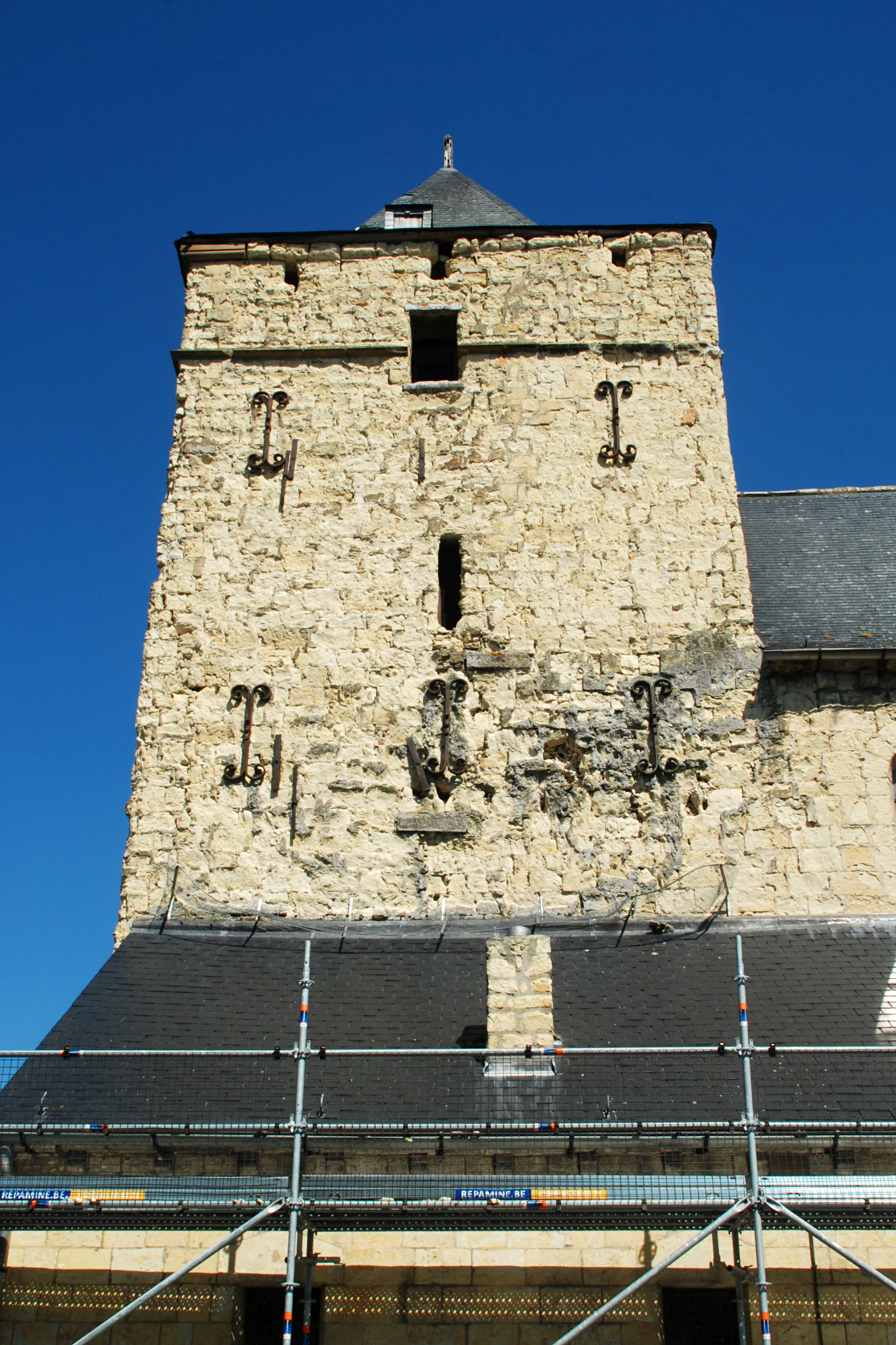 Belgique - Brabant wallon - Hélécine - Neerheylissem - Eglise Saint-Sulpice